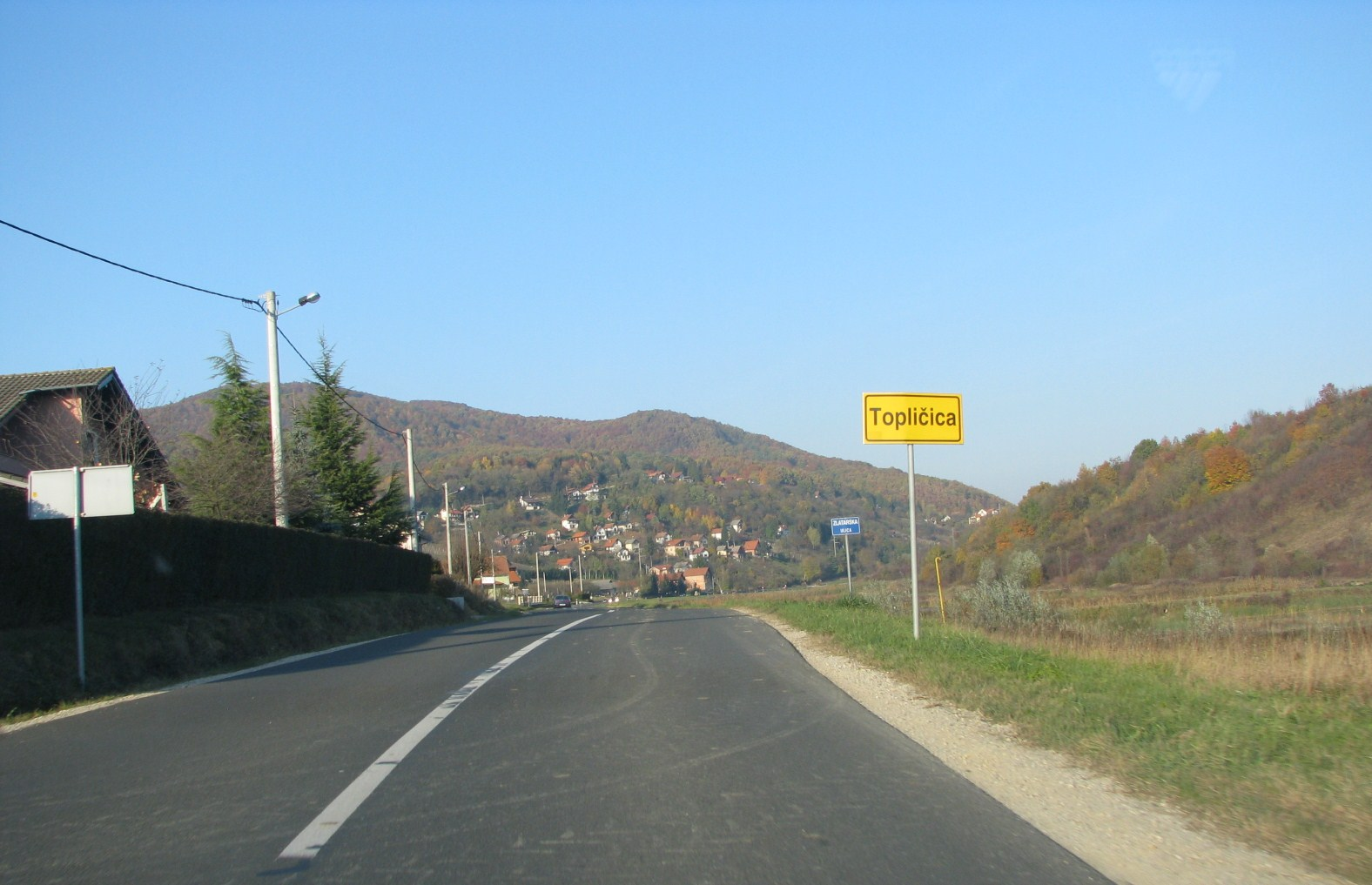 Ulaz u naselje Topličica, Varaždinska županija